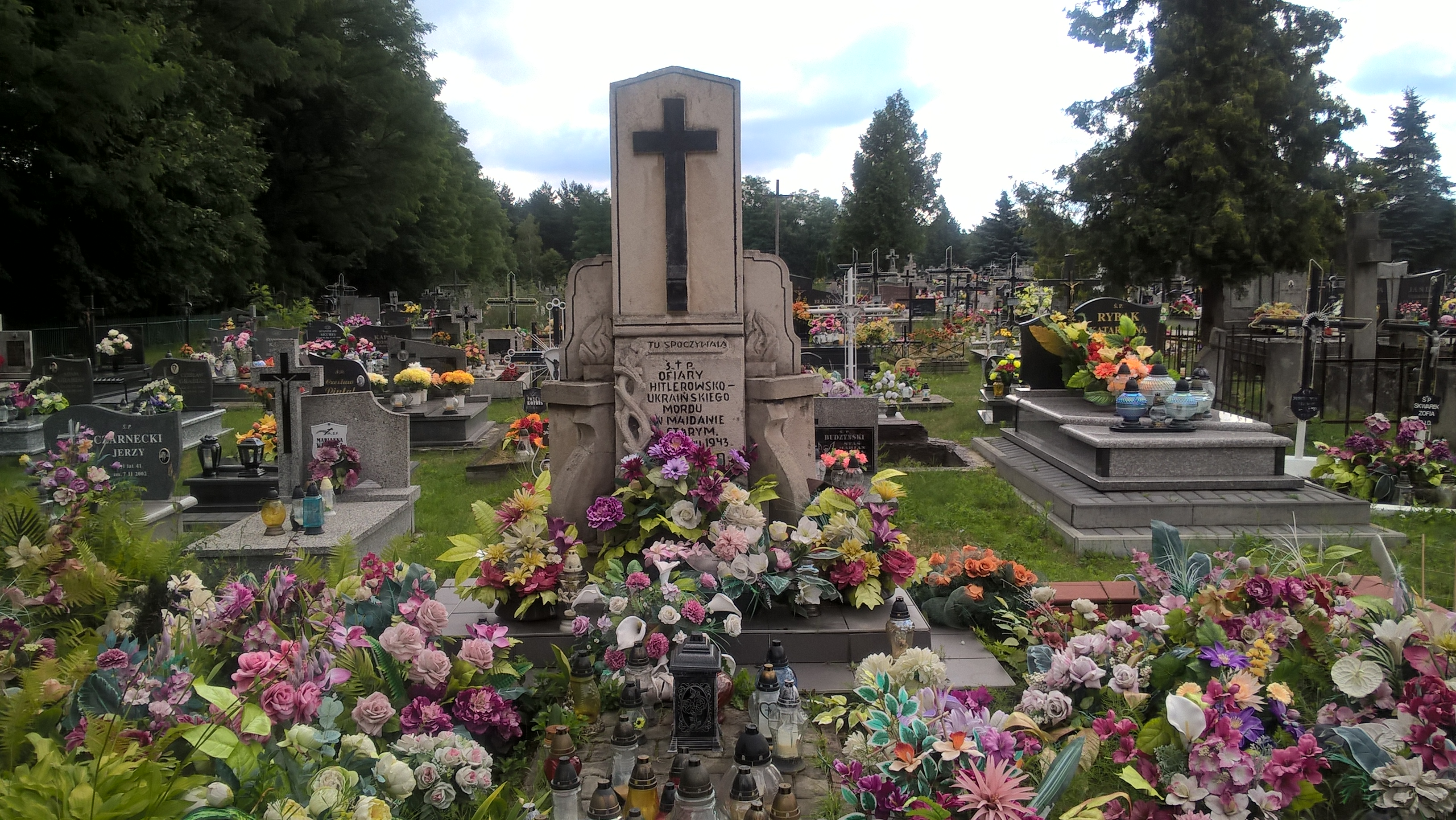 Grób mieszkańców Majdanu Starego zamordowanych przez hitlerowców